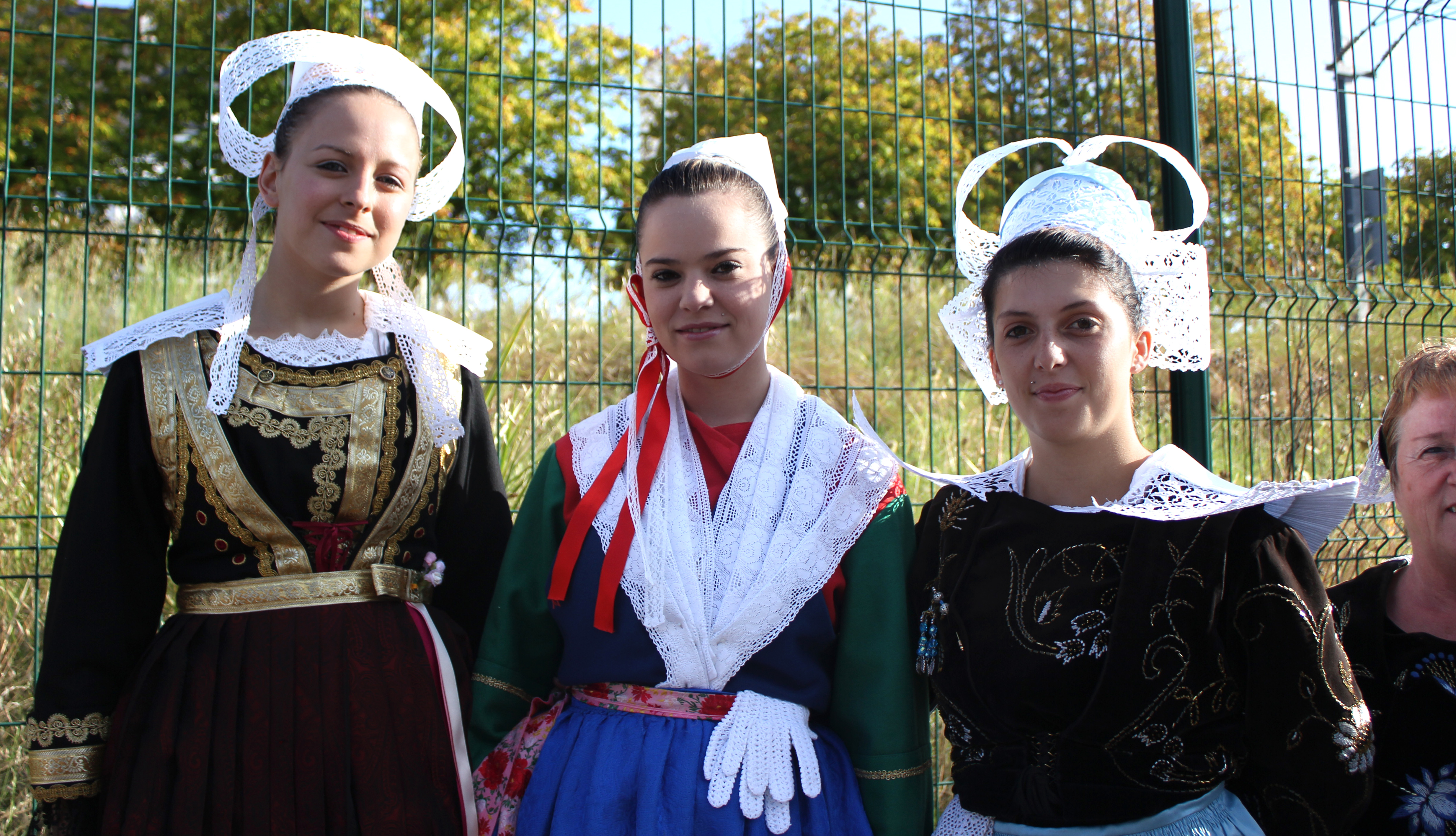 Jeunes femmes en costumes traditionnels des régions de Fouesnant et Plougastel-Daoulas (au centre), prises pendant le festival interceltique de Lorient 2011